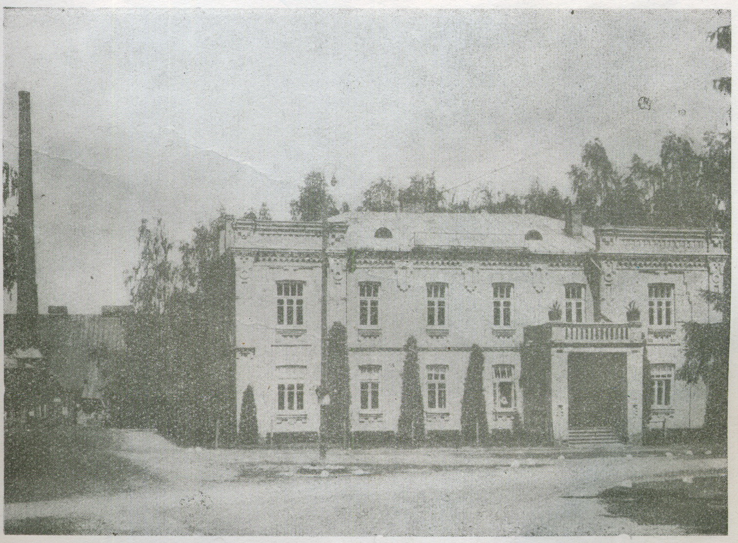 Беларуская (тарашкевіца): Бярозаўка (Biarozaŭka), гута Нёман (Nioman)